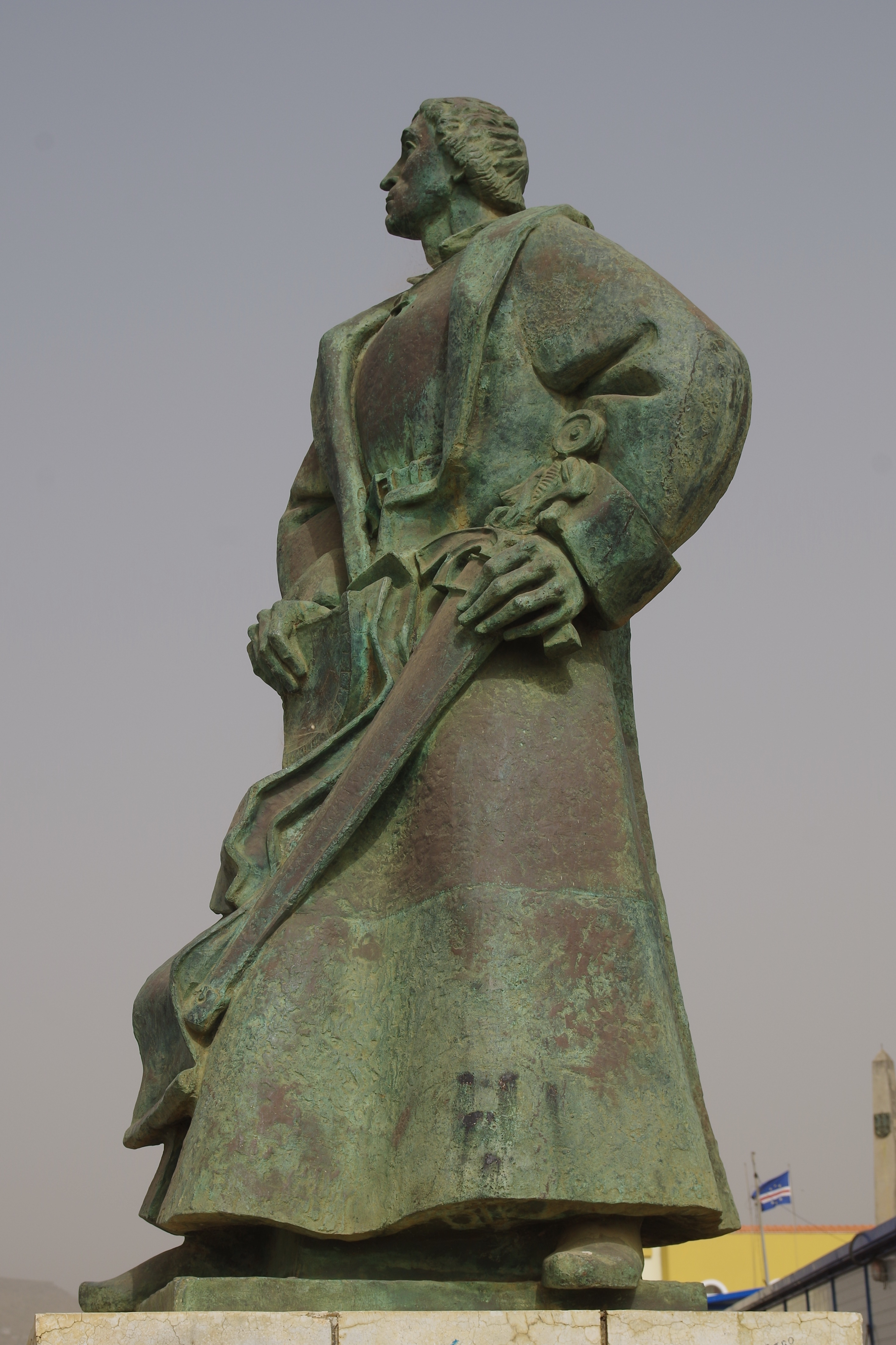 Praia, Monumento do Diogo Gomez